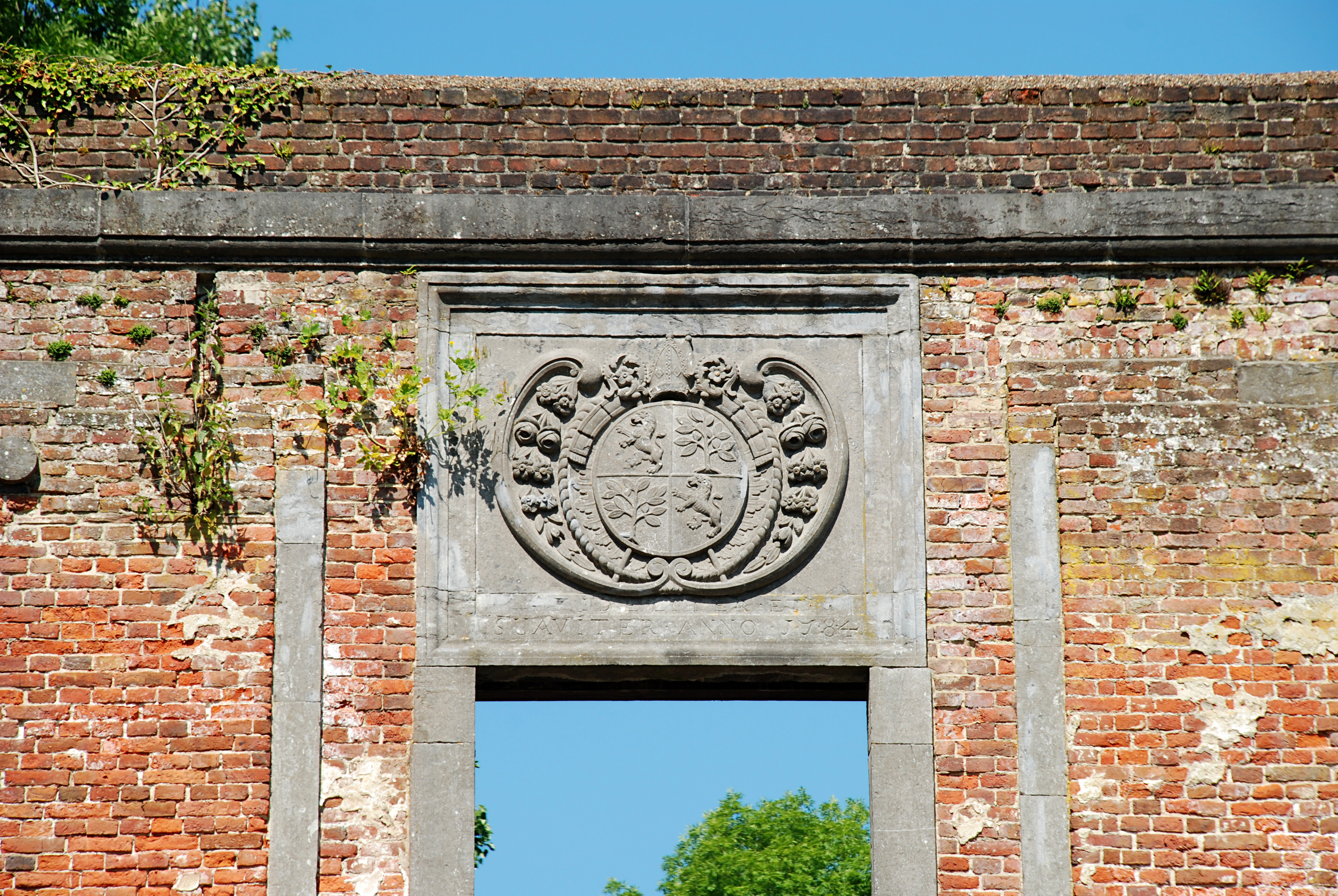 Belgique - Brabant wallon - Villers-la-Ville - ancienne pharmacie de l'Abbaye (photo 2011, avant l'effondrement de novembre 2013)